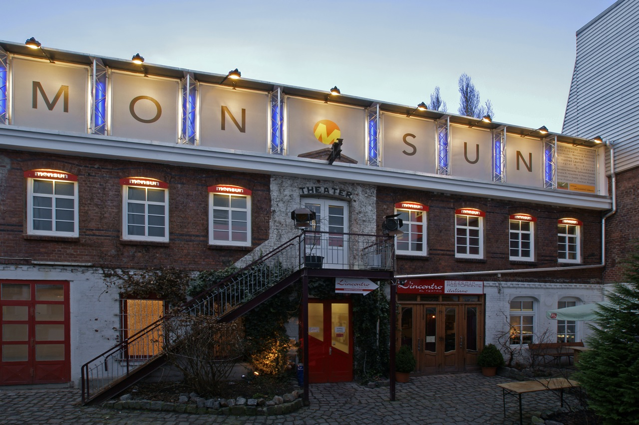 Innenhof der Friedensallee 20, mit Blick auf das monsun.theater